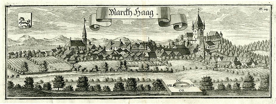 “Marckh Haag” (Haag / Oberbayern), aus : Beschreibung des Churfürsten- u. Hertzogthumbs Ober- und Nidern Bayrn. Rentamt München., 2. Auflage um 1750